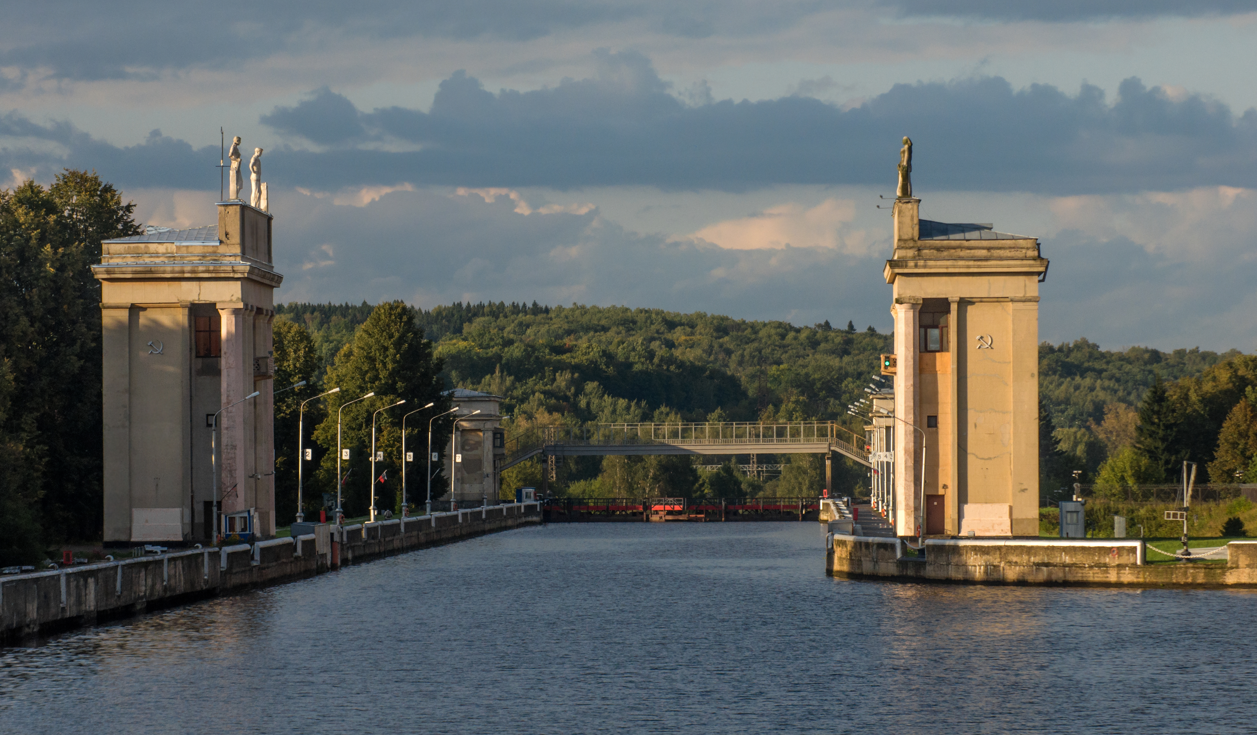 Шлюз № 6 канала им. Москвы: Икша, Дмитровский район, Московская область